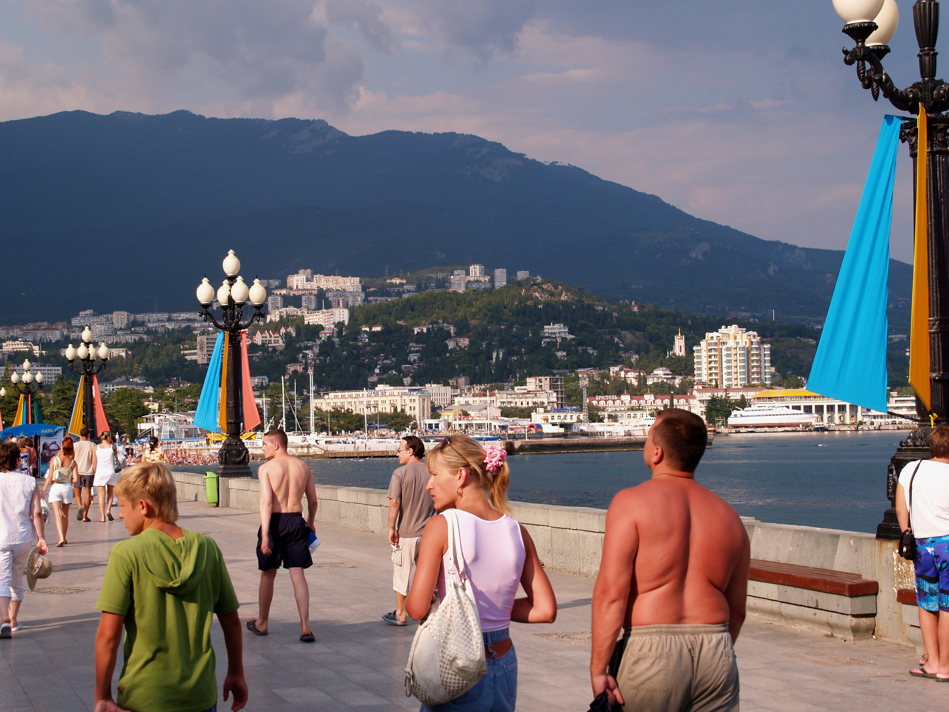 Boardwalk at Yalta Crimea